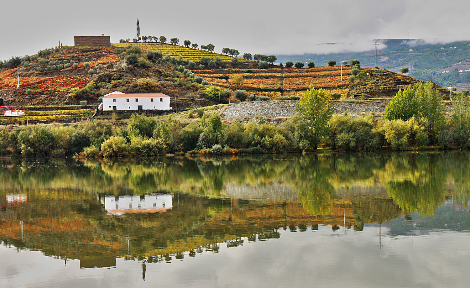 IMG_4136-1 Vallée du Douro